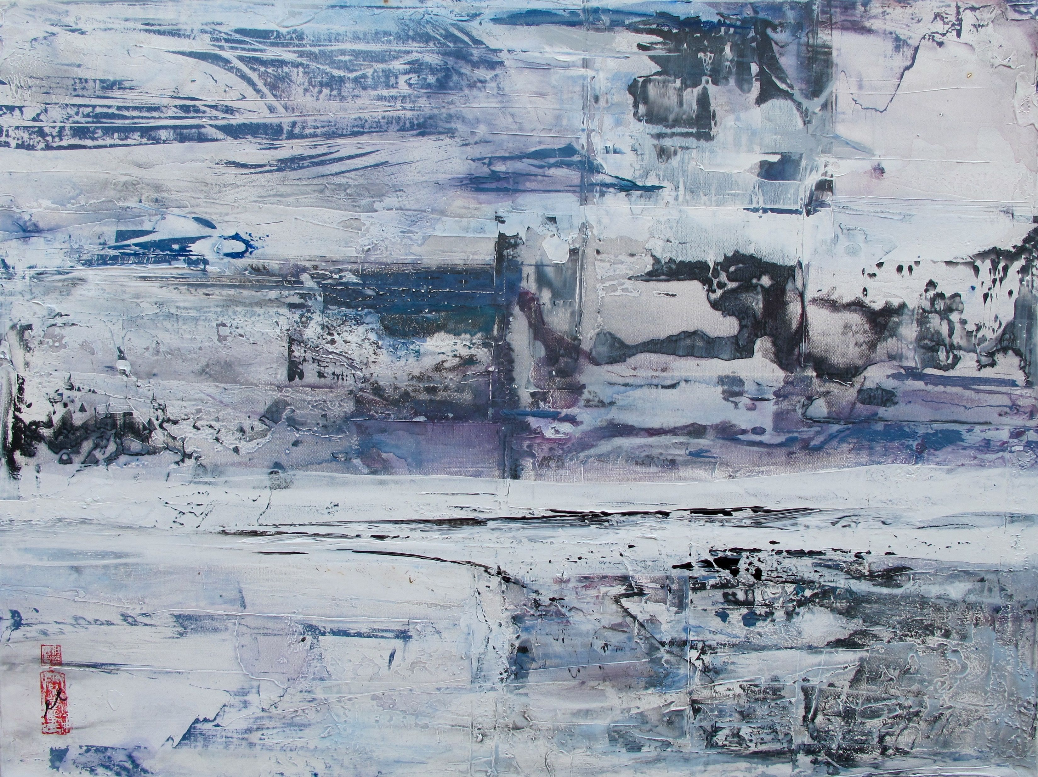 Eva Maria Enders, Sichtweisen III, 2015 Mischtechnik auf Leinwand, 120 x 90